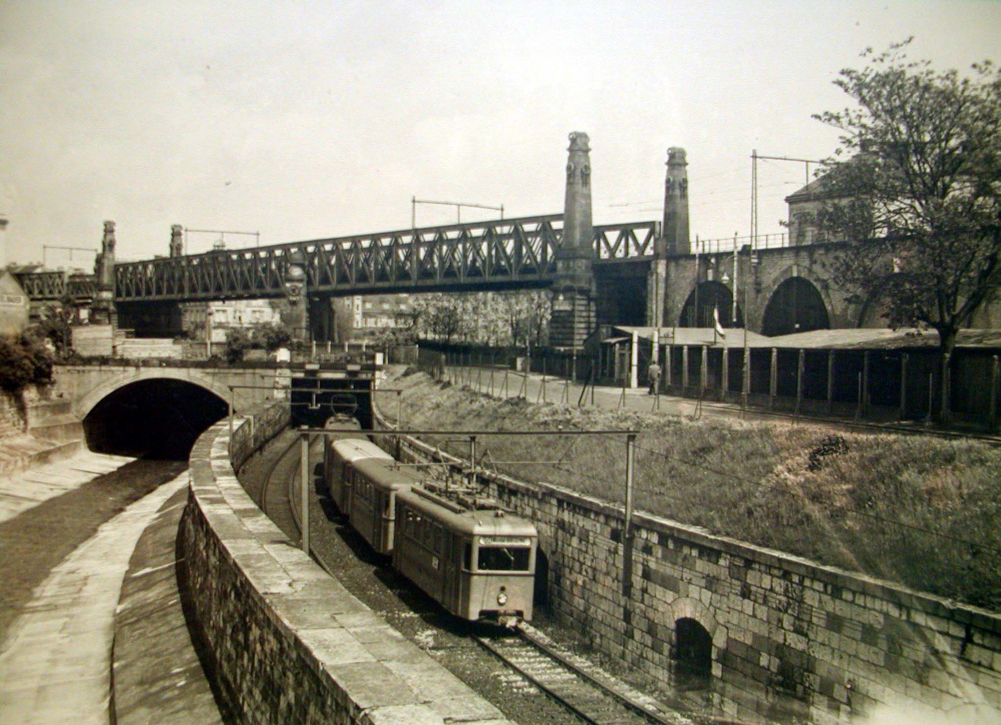 de: Kreuzung der Wiener Stadtbahnlinien bei der Längenfeldgasse